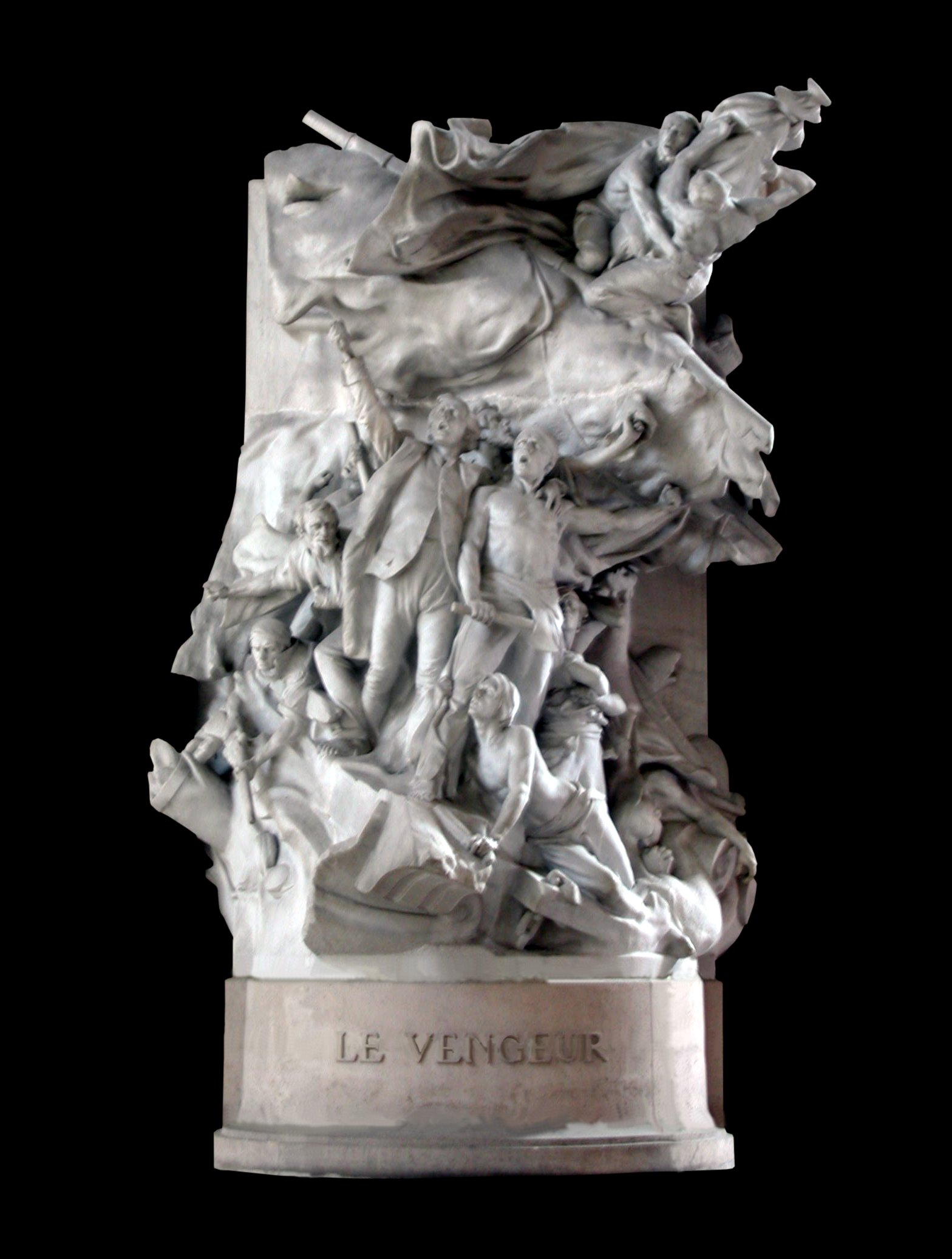 Groupe Le Vengeur, commémorant la bataille du 13 prairial an II, par Ernest Dubois (1863-1930), marbre, 1908, au Panthéon de Paris.